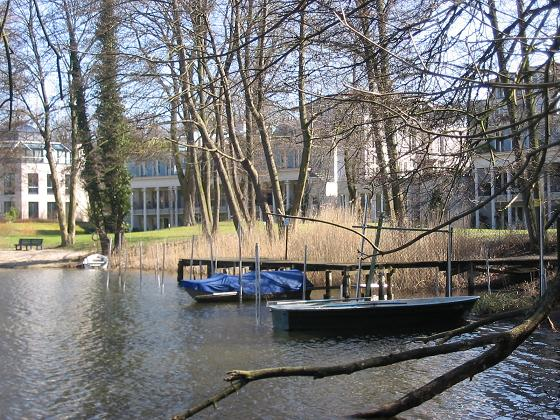 Hundekehlesee, Berlin